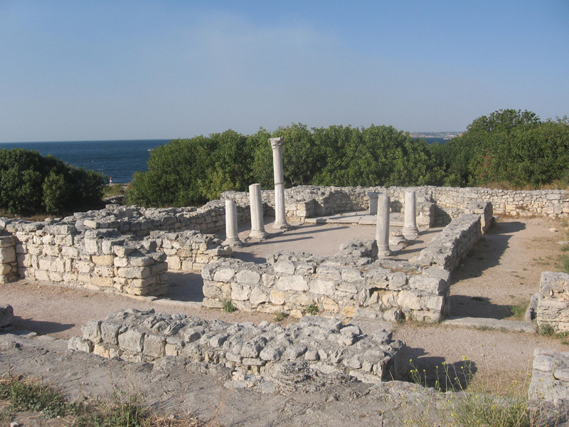 "Basilica in basilica", Khersones, Sevastopol